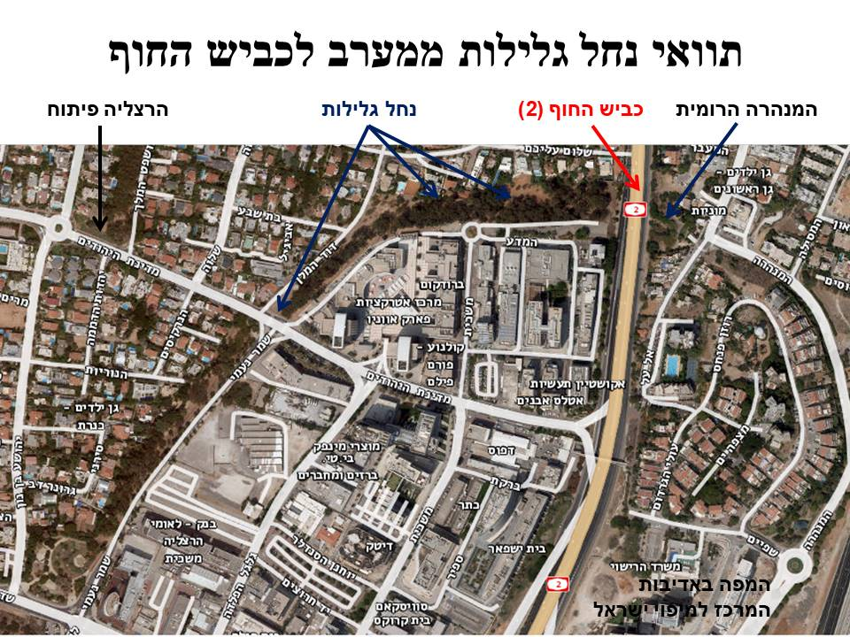 מערב נחל גלילות בתחומי הרצליה פיתוח